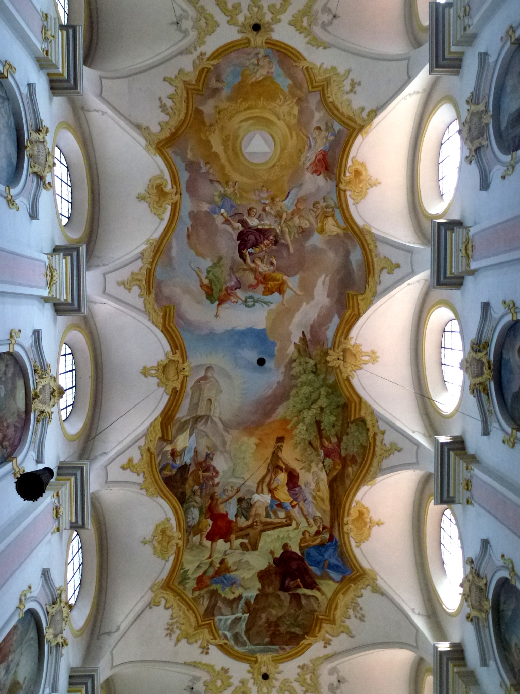 Peterskirche München Germany